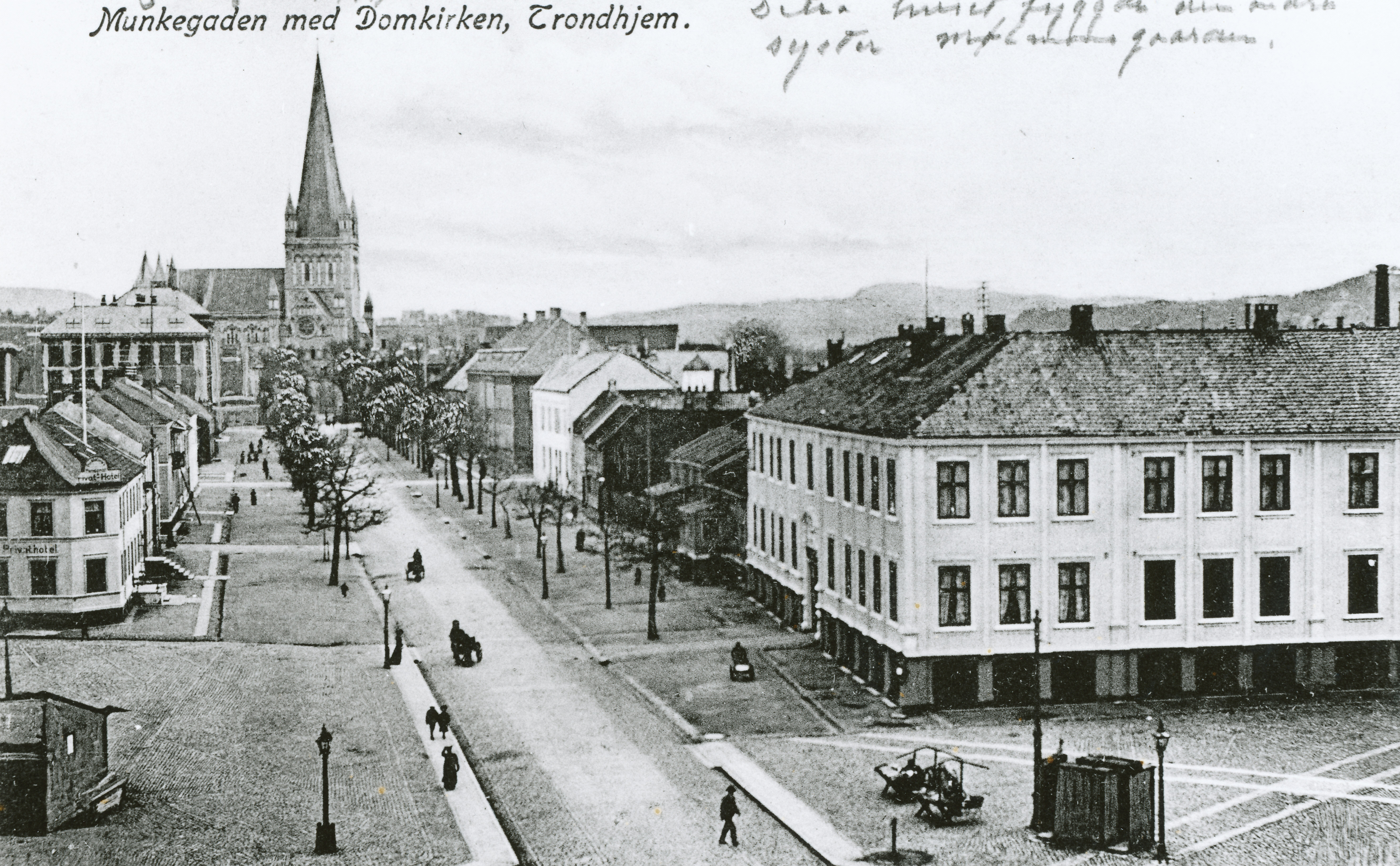 Munkegata / Torvet med Harmonien i 1910. Fra et postkort. Ukjent fotograf.